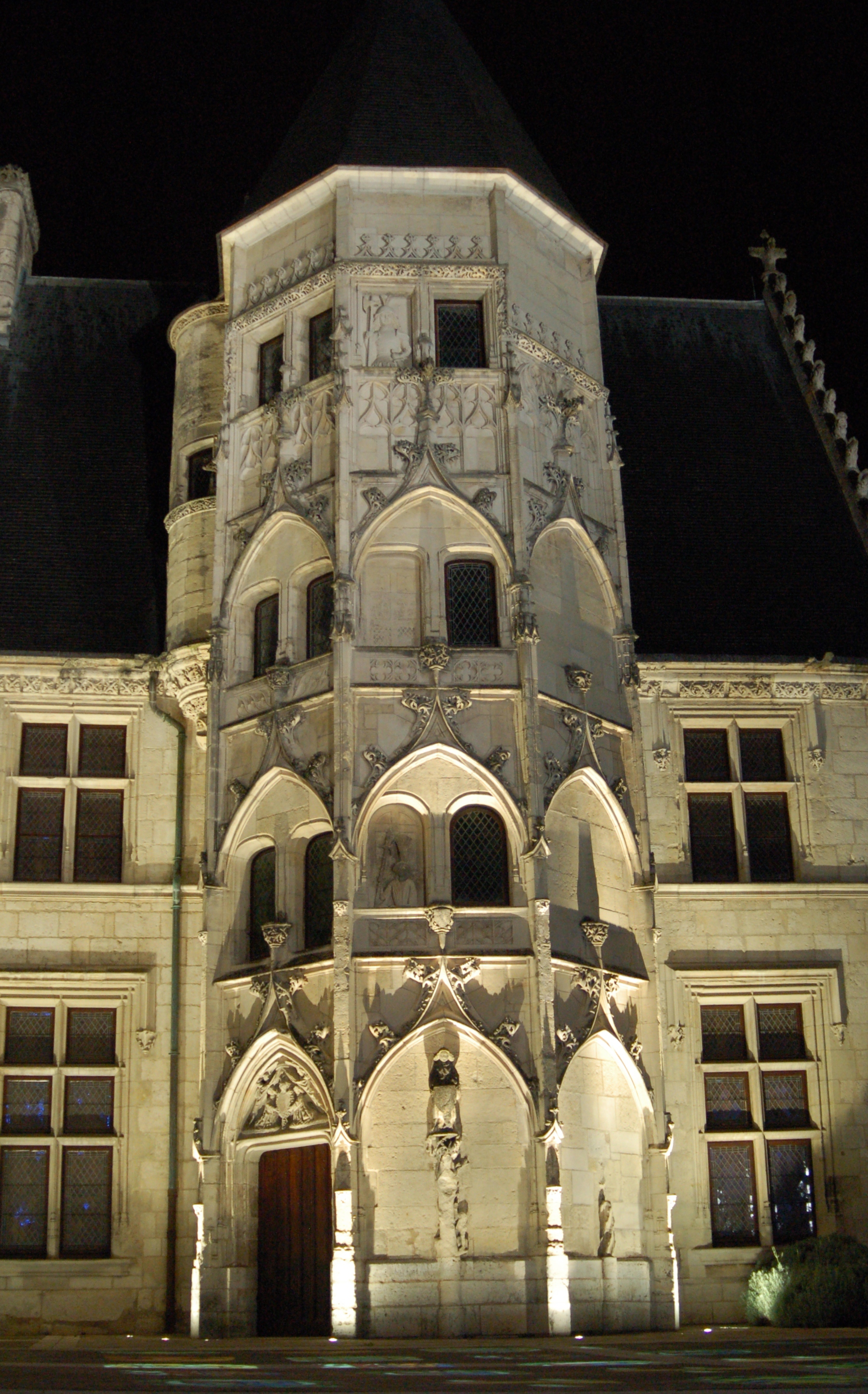 Tour-escalier lors des Nuits Lumière de Bourges